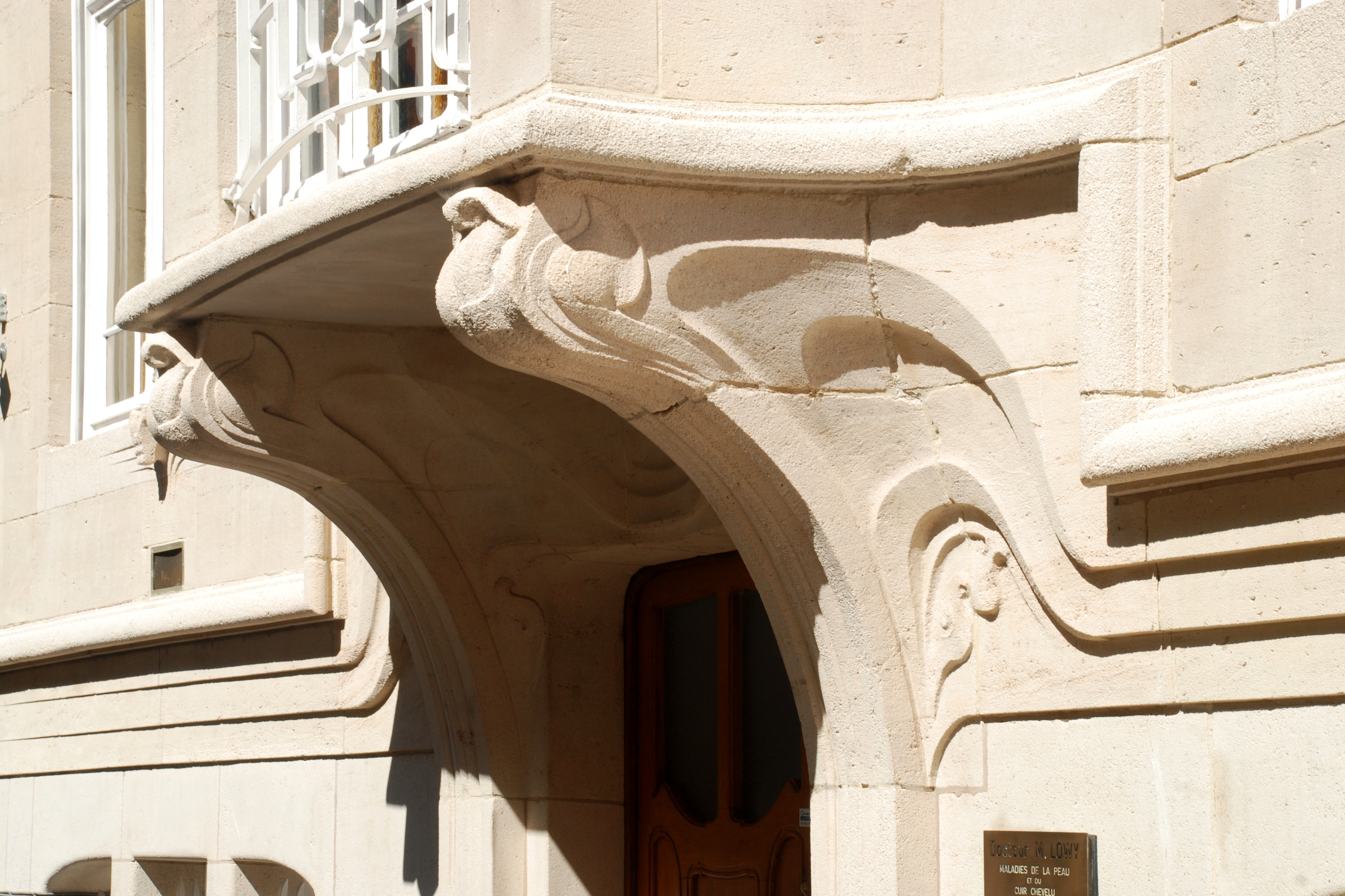 Belgique - Bruxelles - Art nouveau - Emile Lambot - rue Delhasse